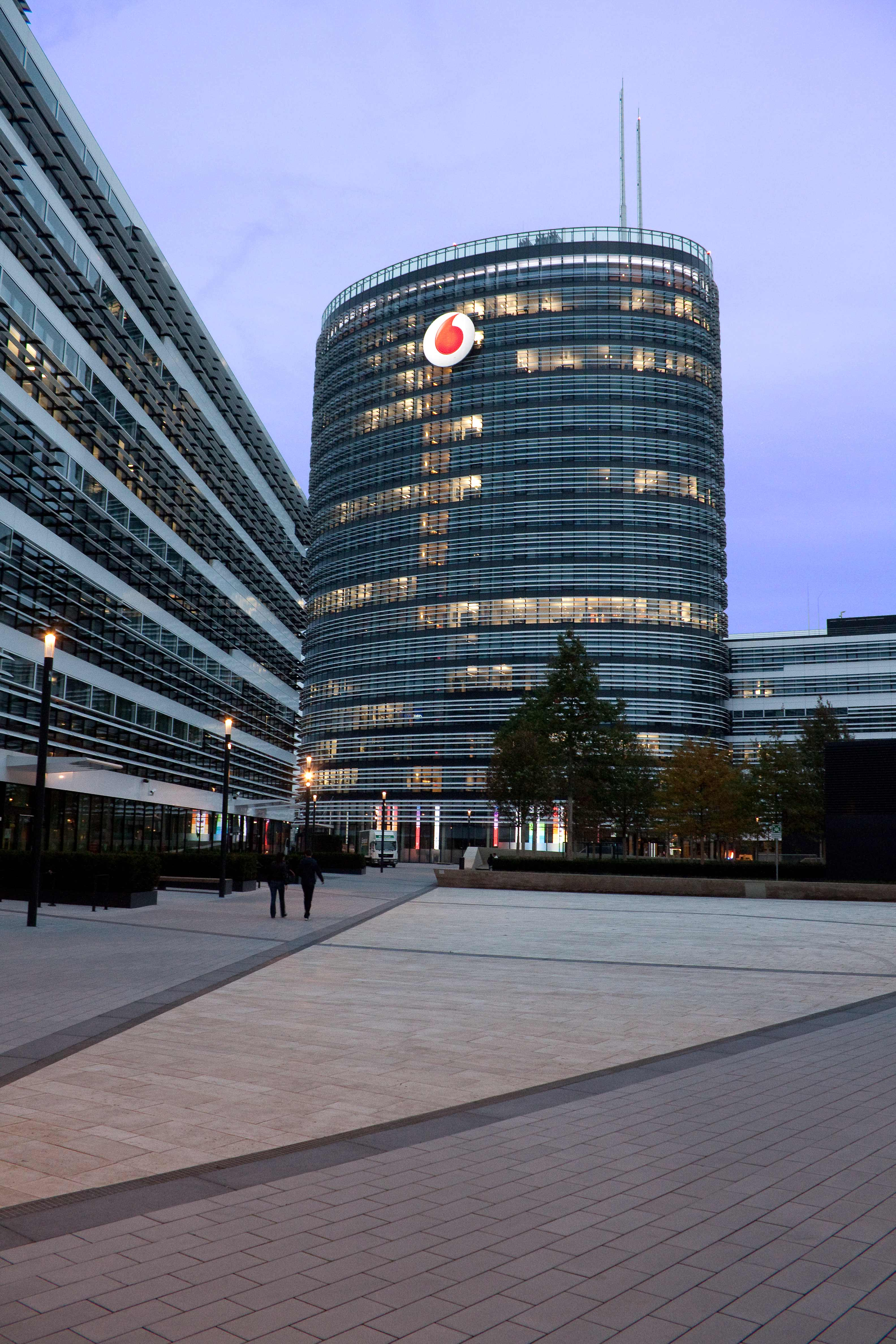 Innenhof mit Sicht auf Hochhaus. Architekt: HPP. Bauherr: Zechgroup / die developper. Nutzer: Vodafone. Bezug 2013.